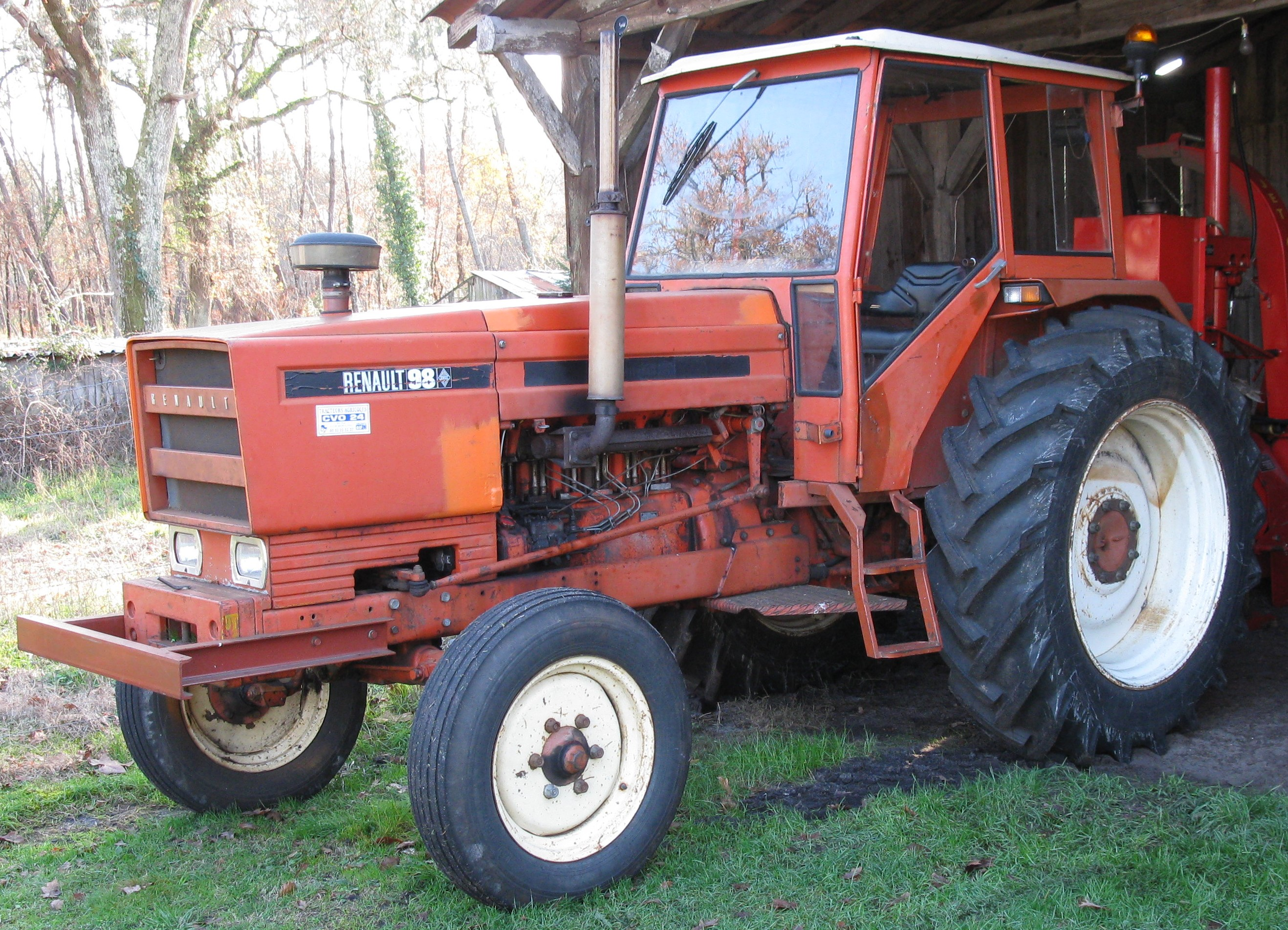 Tracteur Renault type 98 de 1962.